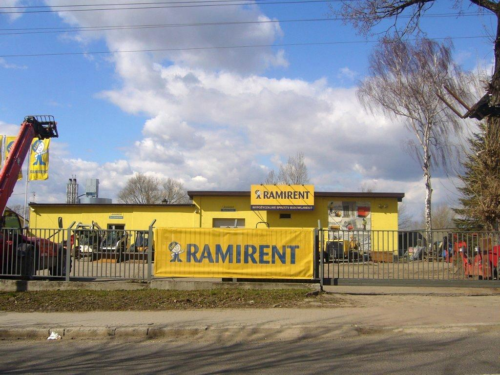 Wypożyczalnia sprzętu budowlanego Ramirent w marcu 2010.